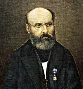 Sujet: De griichesche Komponist Nikolaos Mantzaros - Uelegbild vum G. Kalosgourou, Gemeng vu Korfu (Griichenland). Source: Fondatioun vun der Hellenescher Welt Lizenz: Domaine public